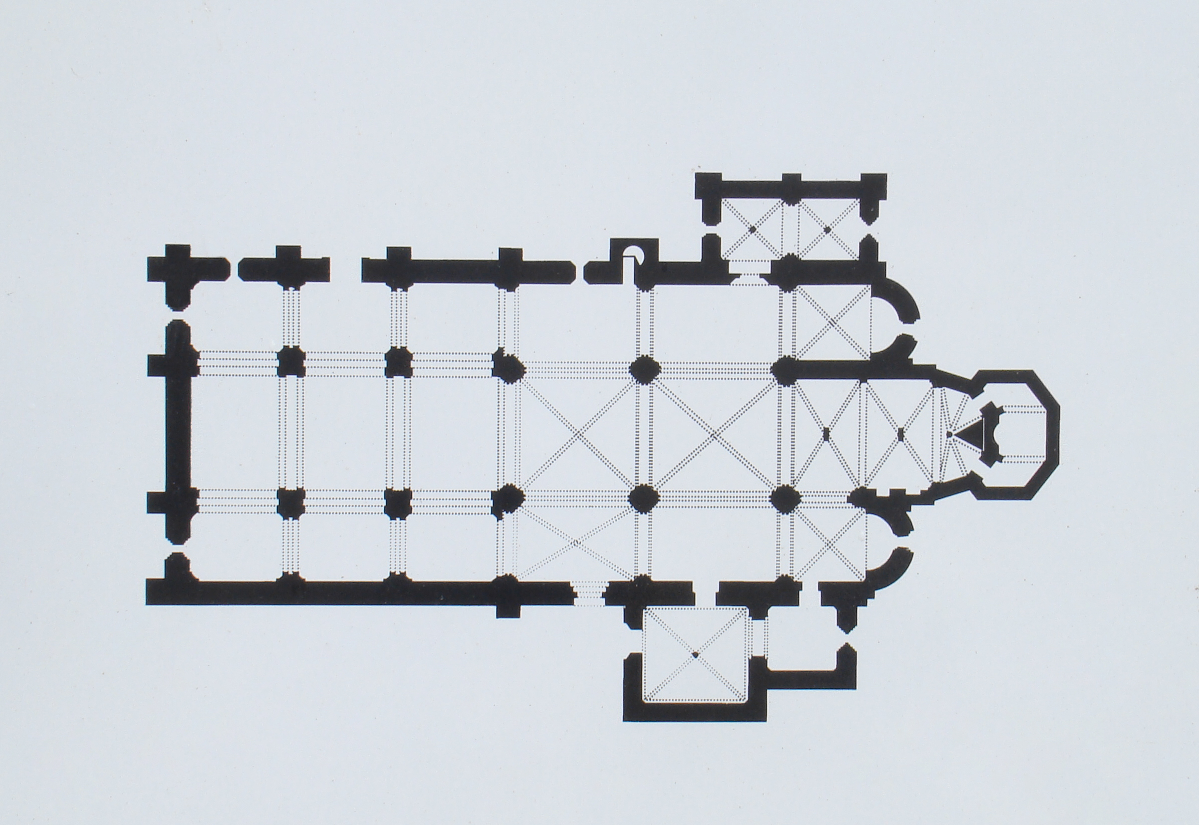 Monasterio de Palazuelos en la provincia de Valladolid. Interior de la iglesia. Dibujo de la planta de la iglesia; corresponde al cartel anunciador para visitas del monasterio.